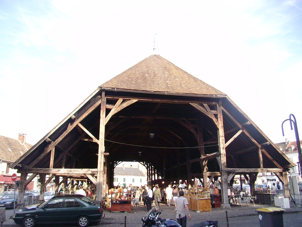 Façade Ouest de la grande Halle d'Arpajon (91)